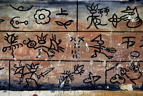 Naxi storyboard